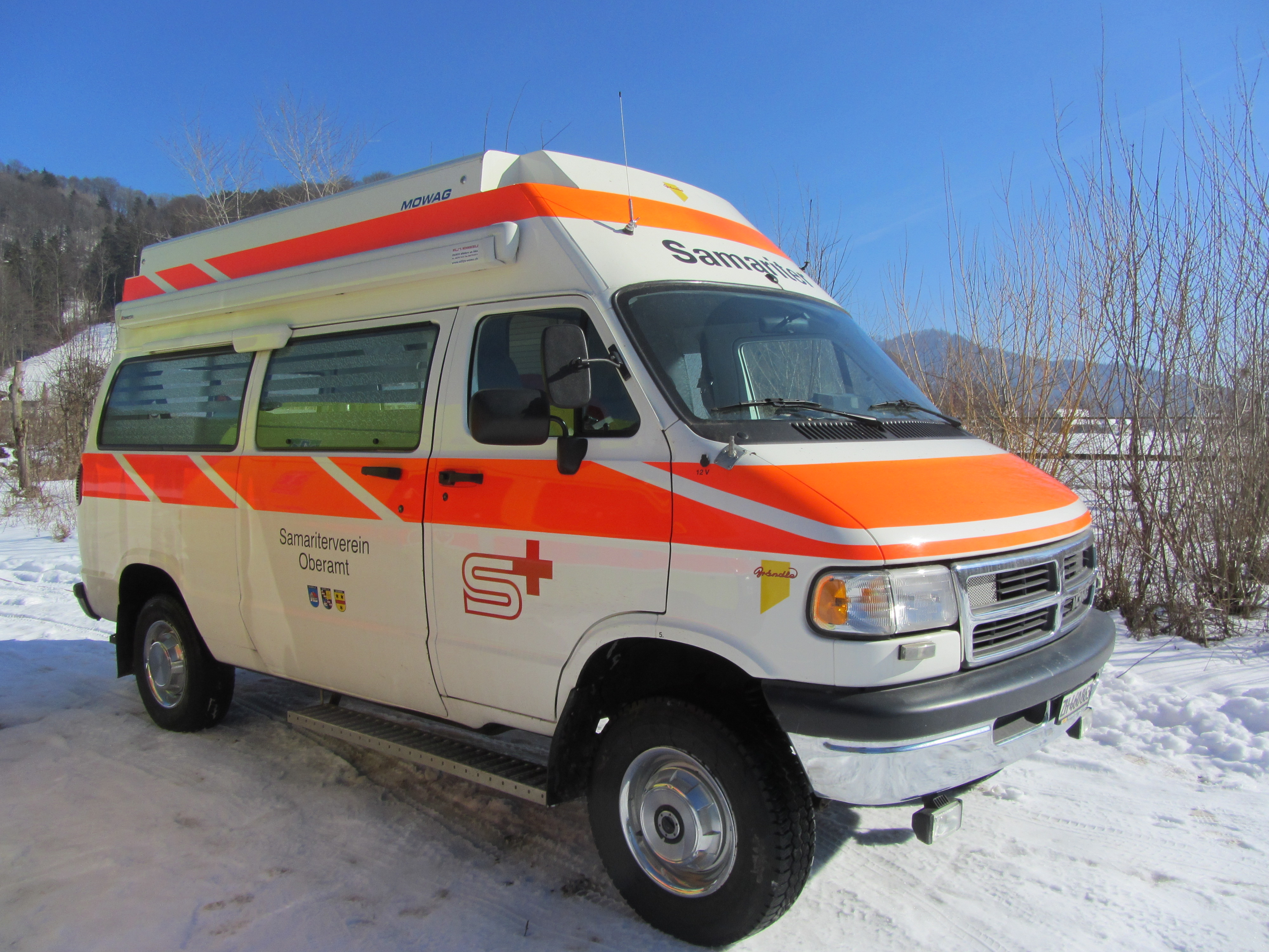 Türlersee Seegfrörni in Hausen am Albis (Switzerland)